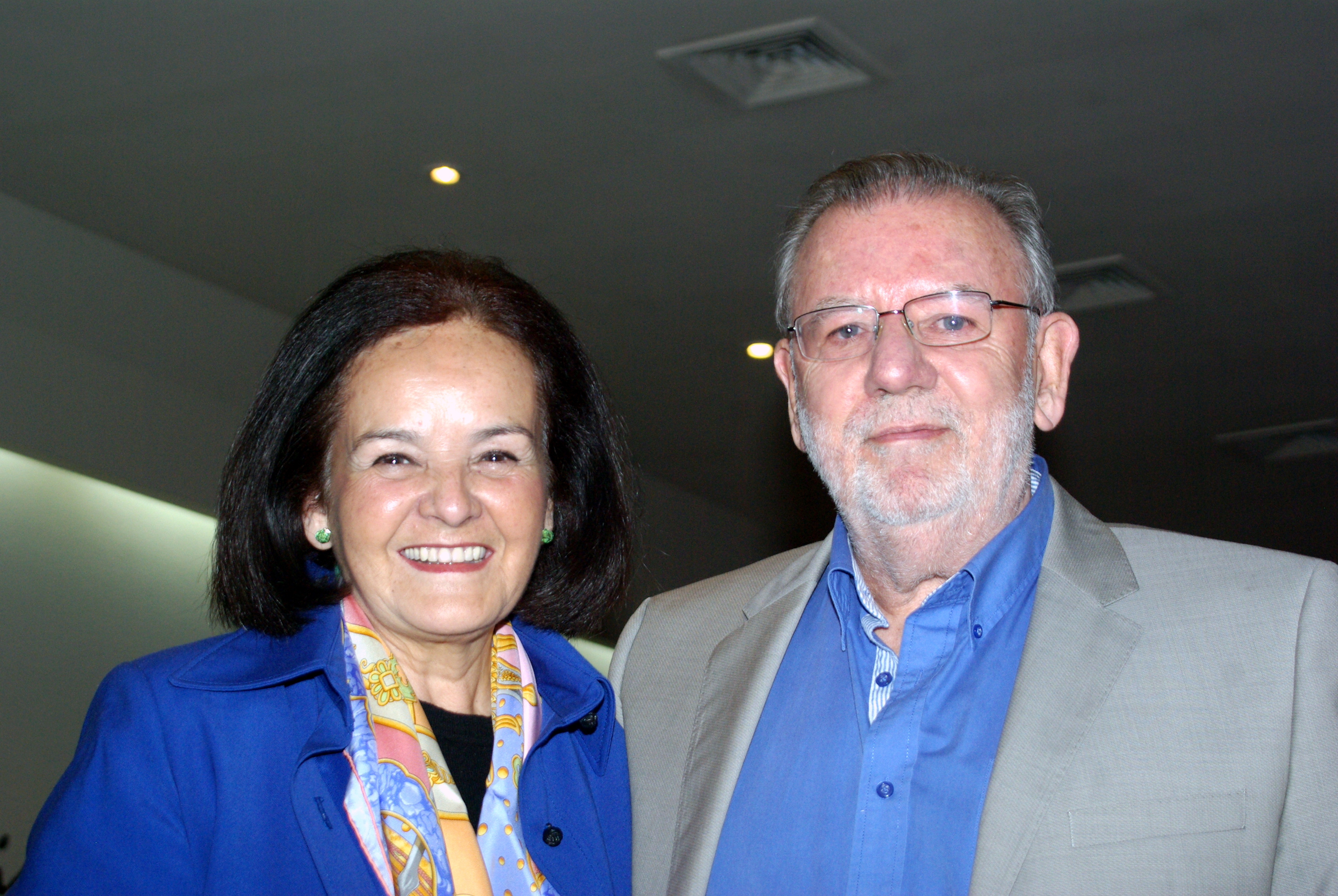 María Teresa Herreros, miembro de la Fundación Vicente Huidobro, y el poeta Óscar Hahn en la presentación del libro Vicente Huidobro: Poesía y creación; Casa Cultural de Las Condes, Santiago de Chile, 6 de mayo de 2013